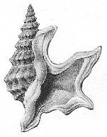 Aporrhais pespelicani